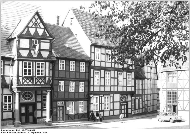 Quedlinburg, Platz Finkenherd, Klopstock-Haus ADN-ZB Kaufhold 9.9.81 Quedlinburg: Zu den bekanntesten Fachwerkbauten aus dem 15. bis 18. Jahrhundert gehören die Häuser am Platz Finkenherd mit dem Klopstockhaus (Mitte). Die im Harzvorland an der Bode gelegene Kreisstadt im Bezirk Halle wurde 922 erstmals als "Villa Quitilingaburg"" urkundlich erwähnt.